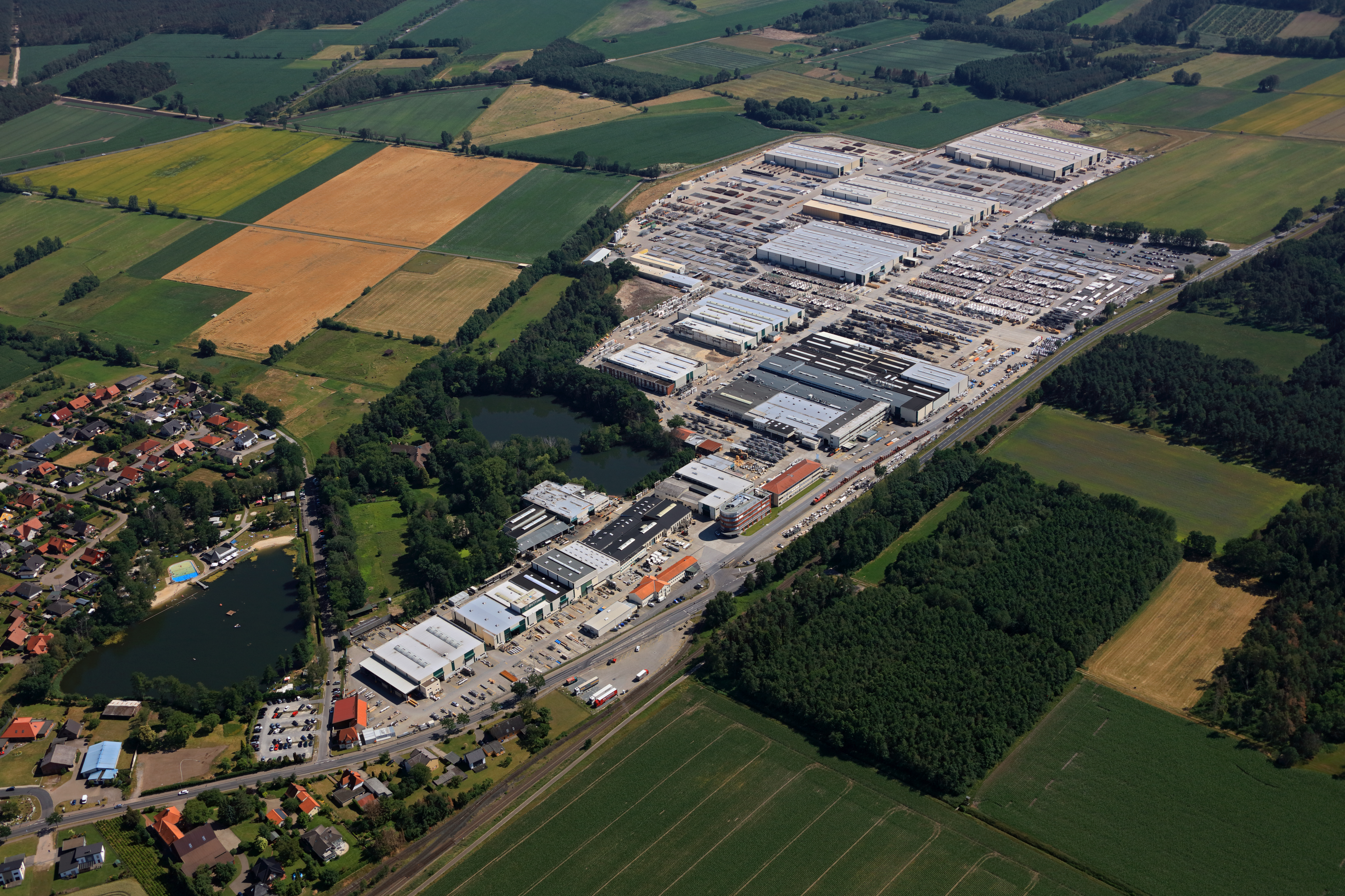 Luftbild des Firmensitzes